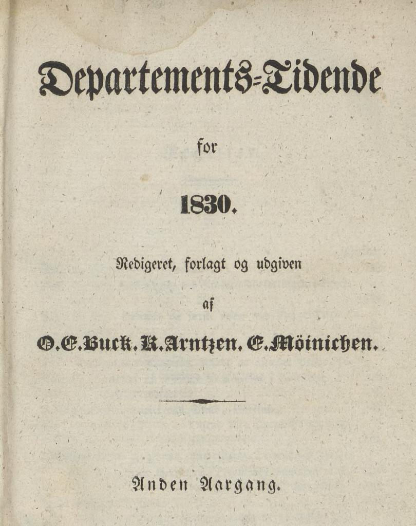 Tittelbladet til Departements-Tidende, 1830